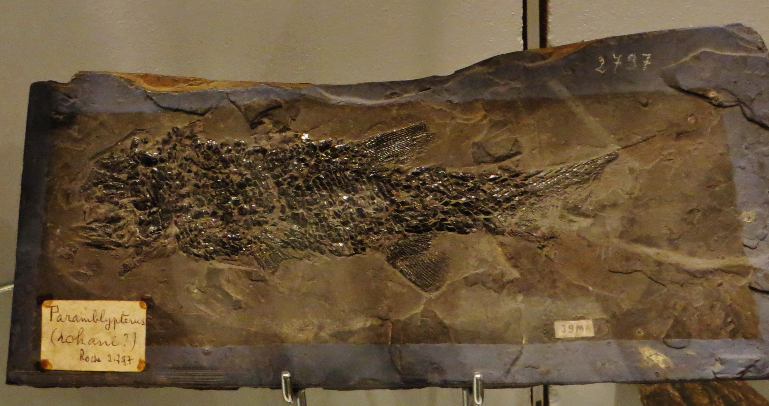 Fossil - Took the picture at Museum of Natural History, Autun